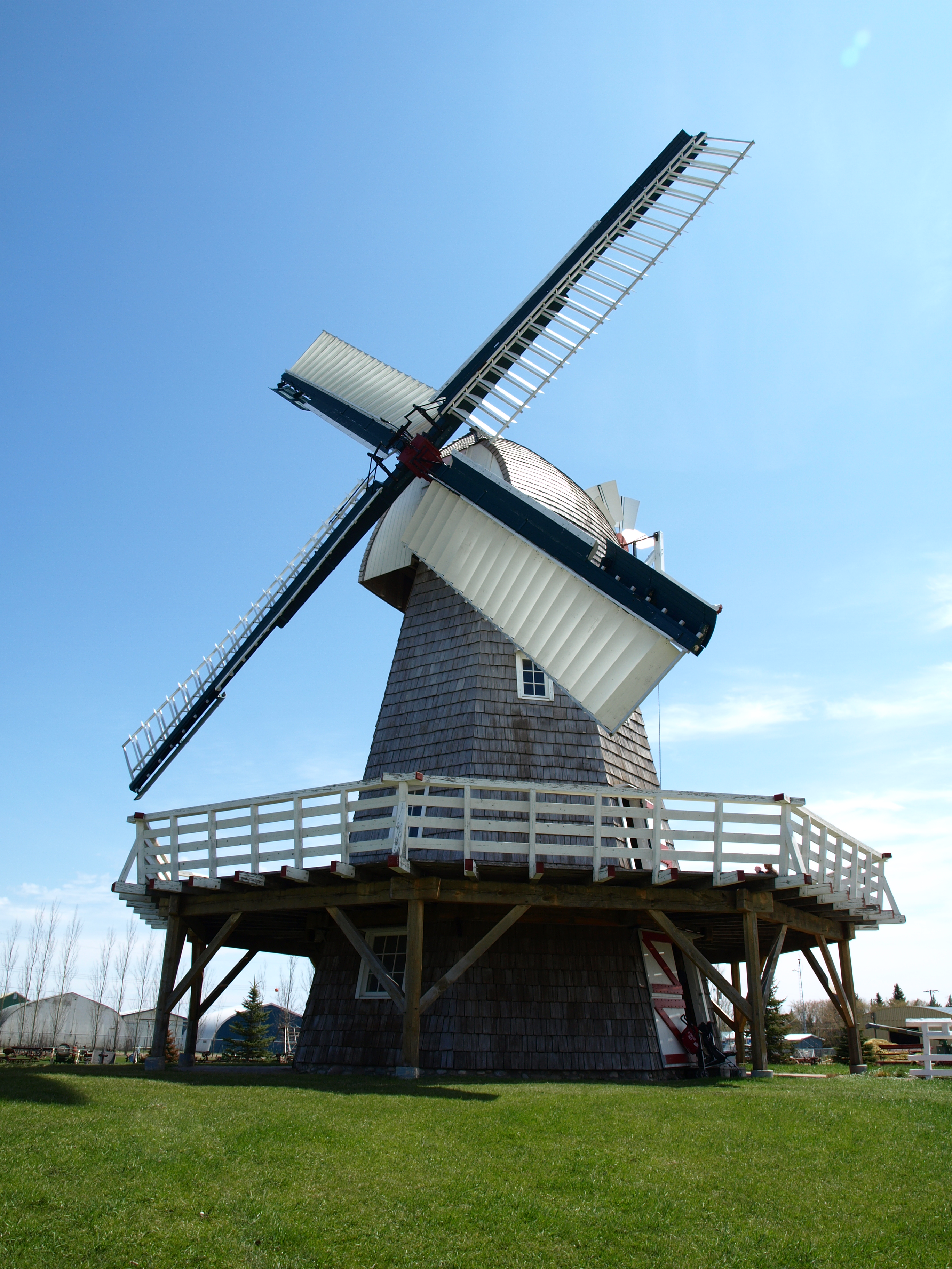 Wind Mill in Mennonite Heritage Village Steinbach Manitoba Canada